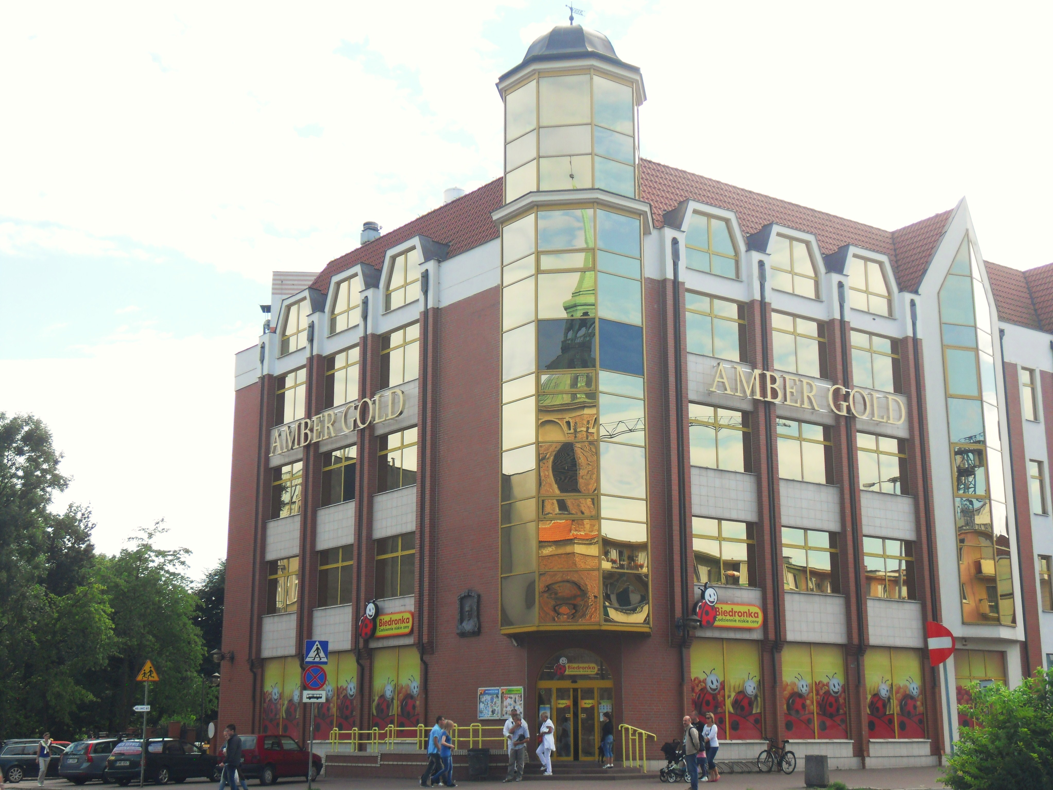 Gdańsk Długie Ogrody. Ul. Długie Ogrody 14: "Amber Gold" i "Biedronka".